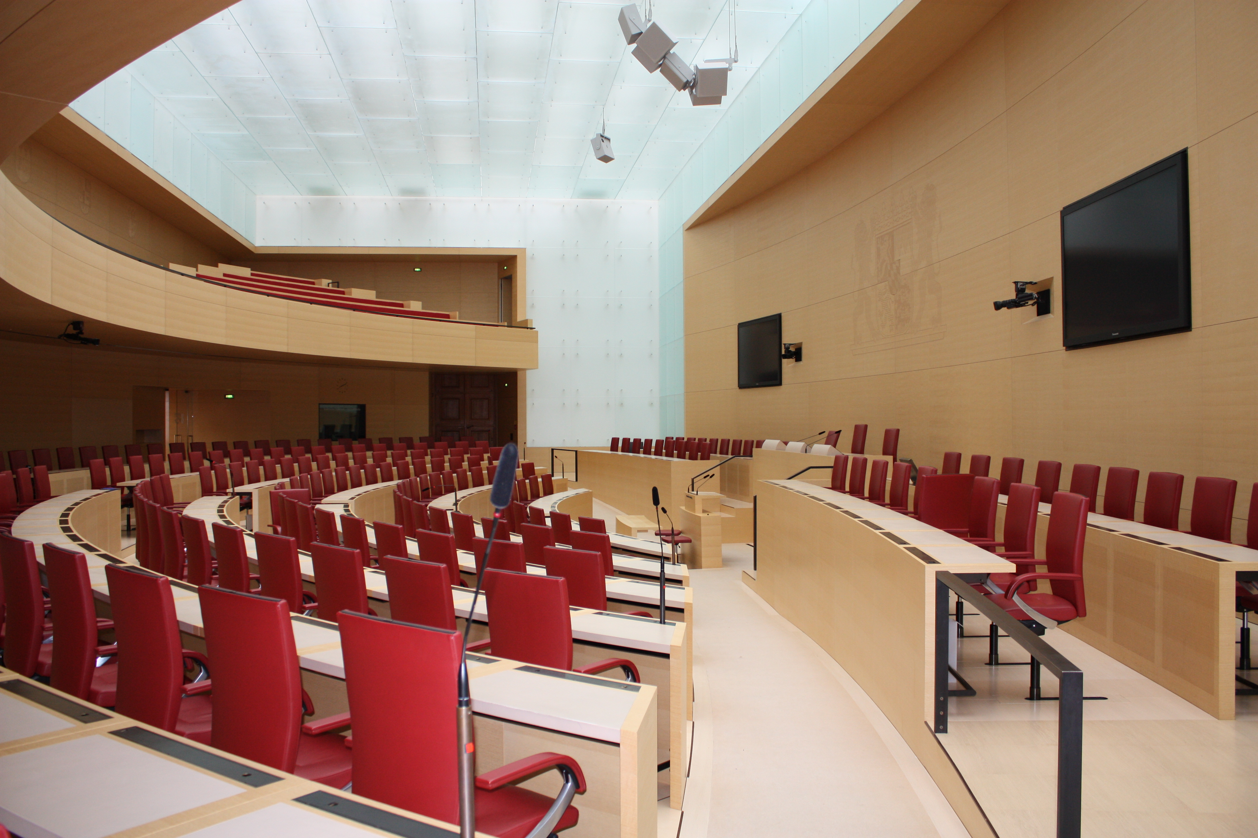 Plenarsaal im Bayerischer Landtag / Maximilianeum